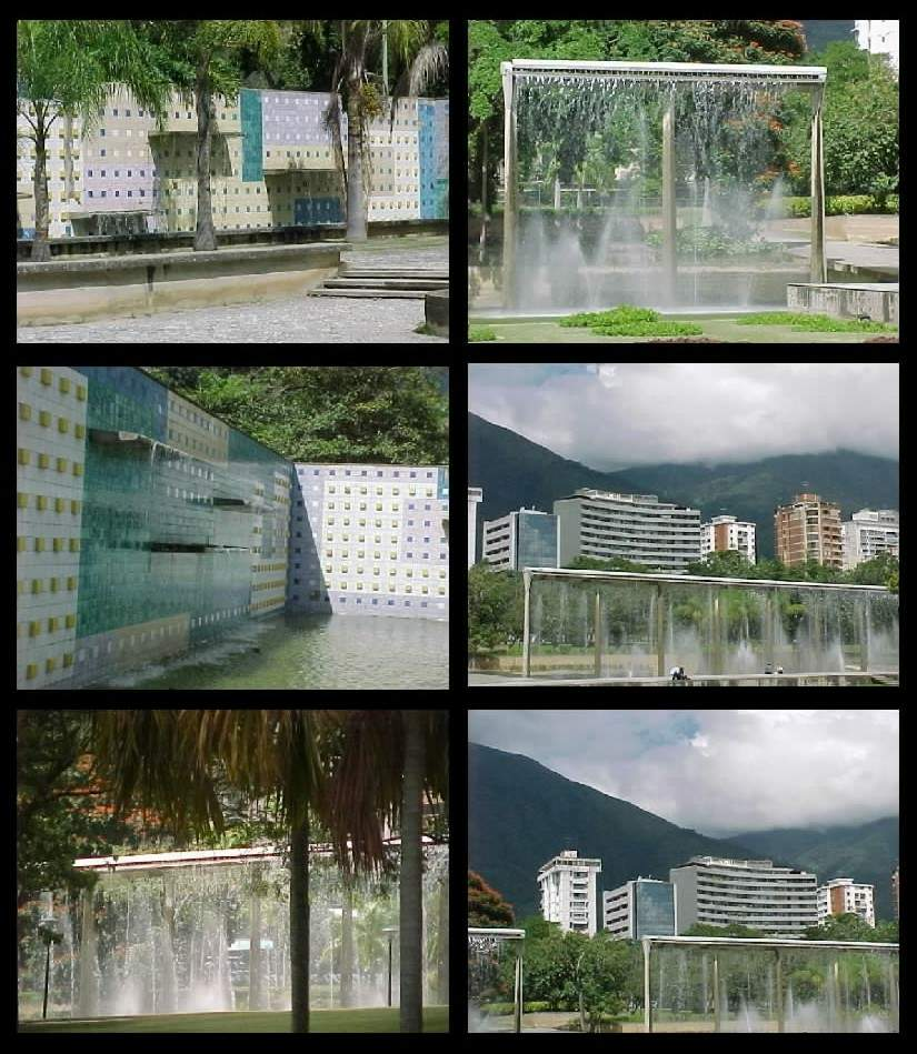 Patios en el sector Norte Parque Generalisimo Francisco de Miranda Caracas - Venezuela